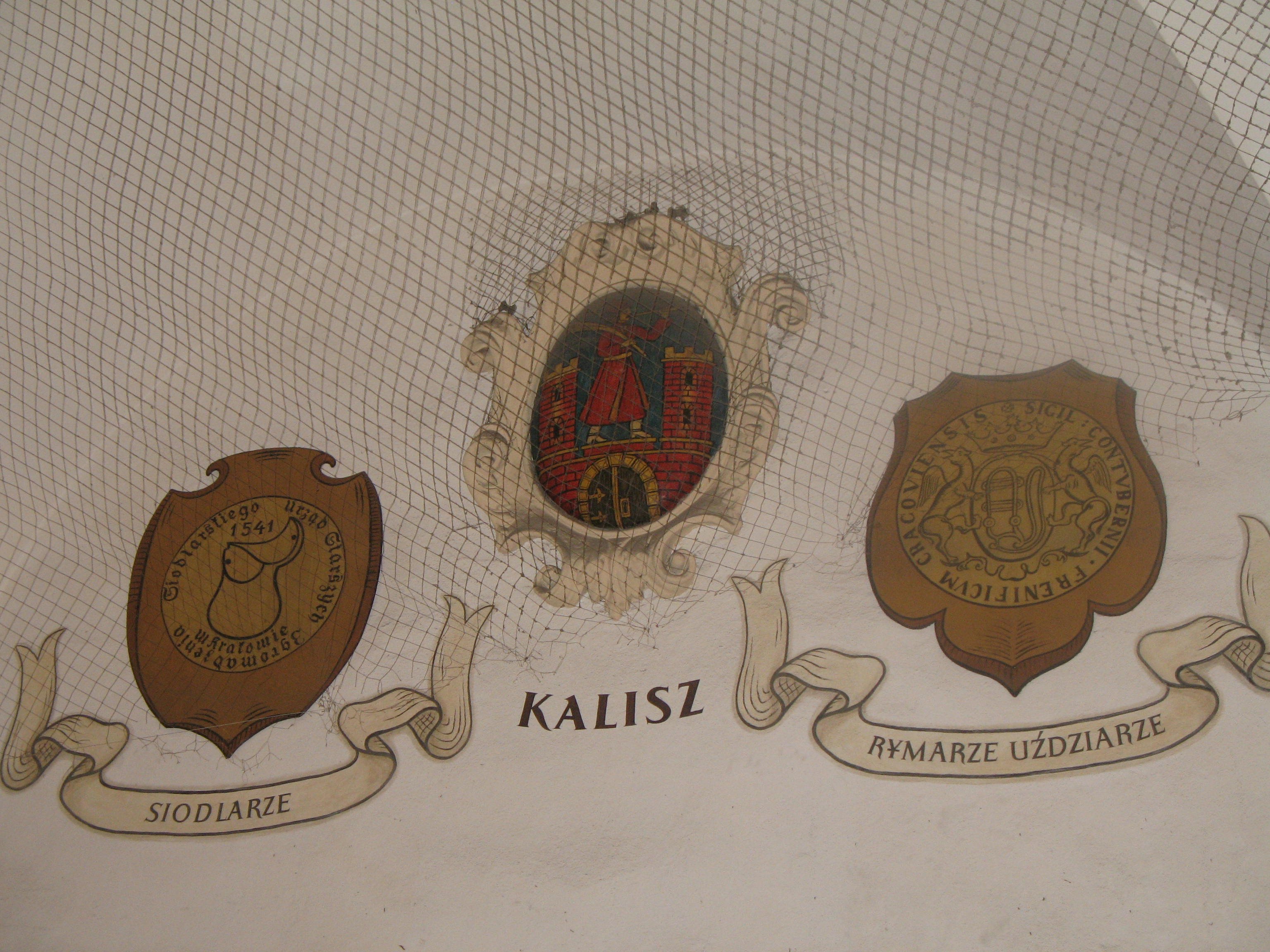 Sukiennice in Kraków, Poland